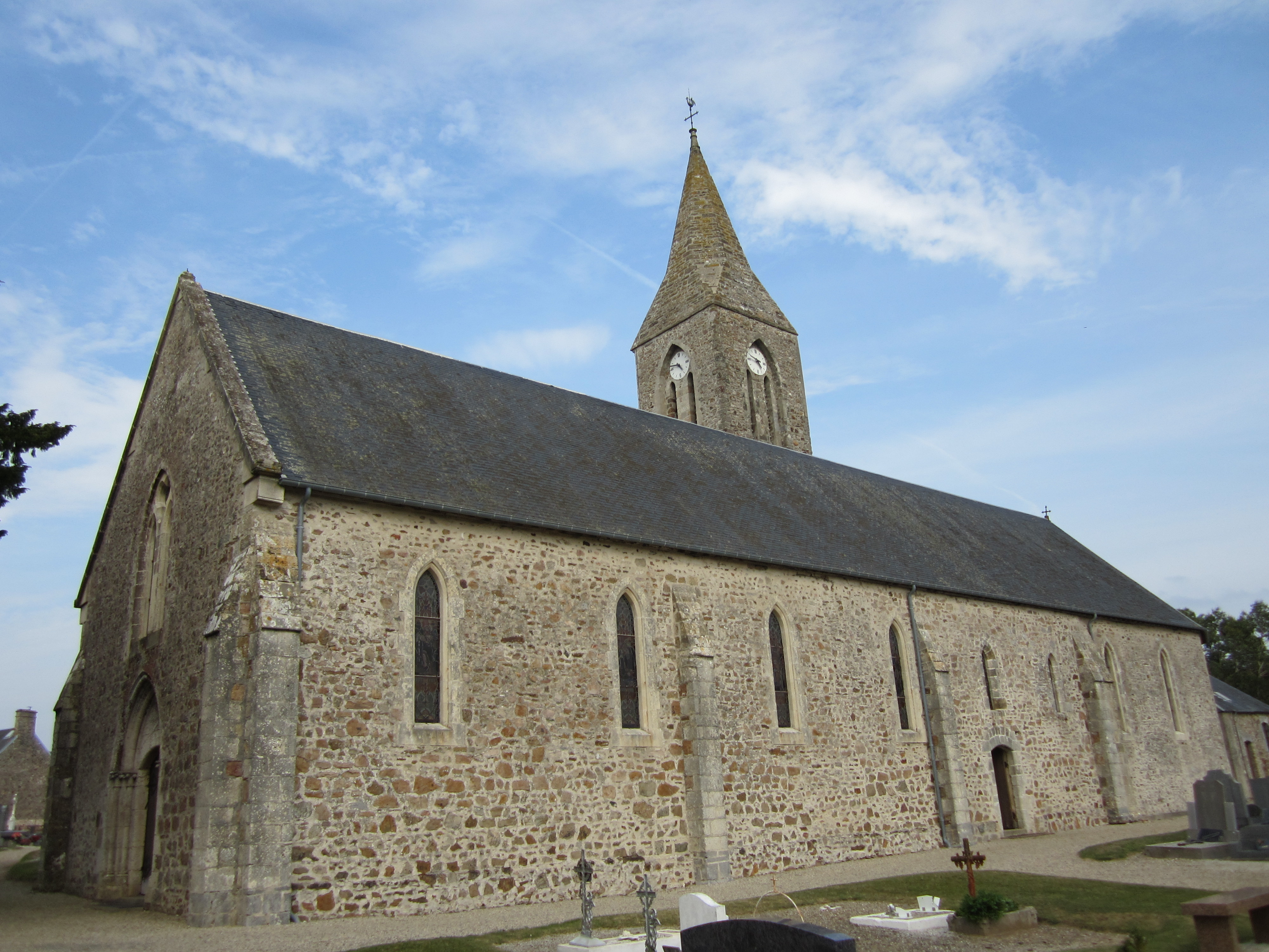 Église Saint-Samson de Geffosses